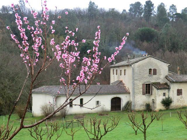 Le mas des Abeillères, à Saint-Jean-du-Gard (France), au printemps